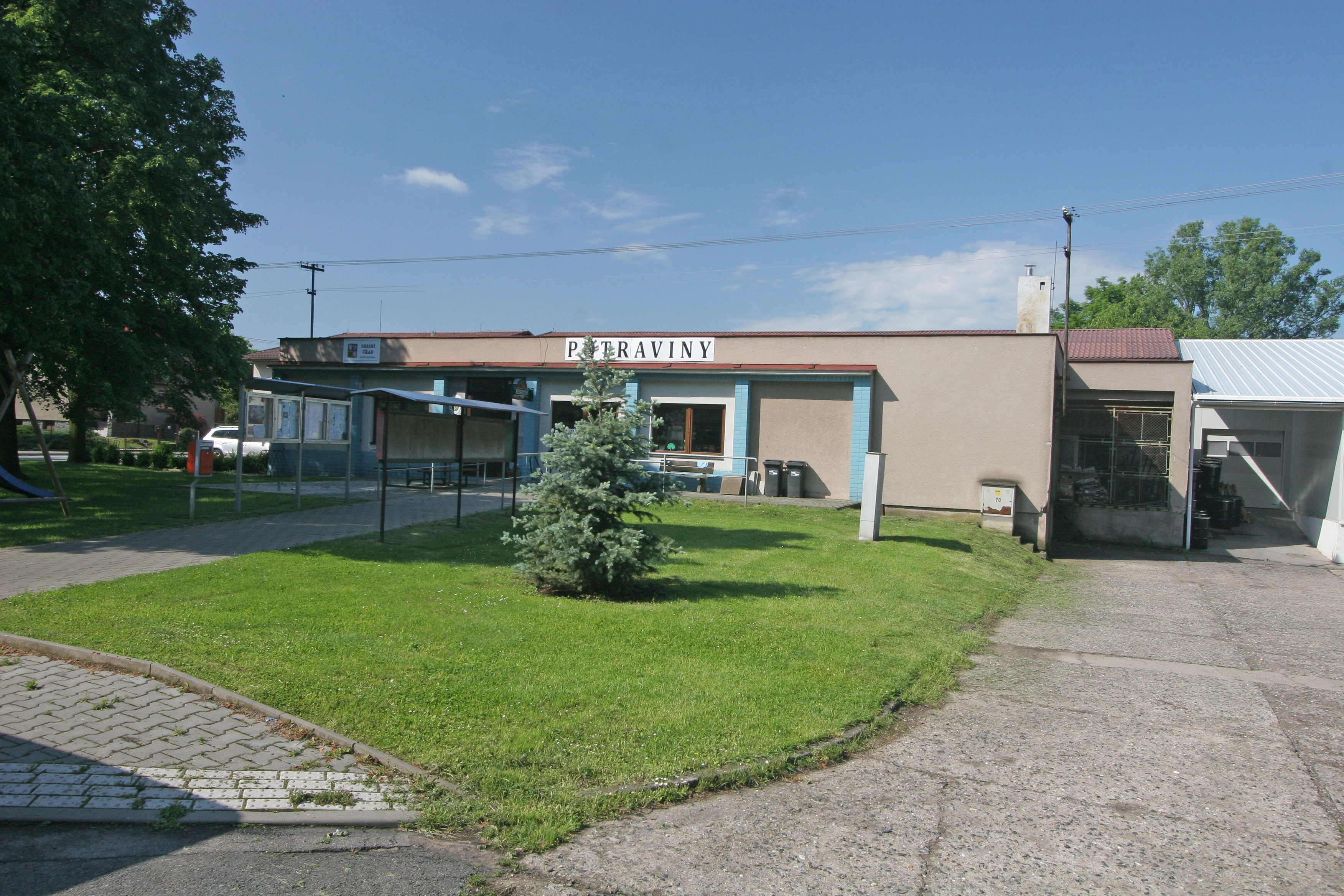 Starý Mateřov - obecní úřad a prodejna